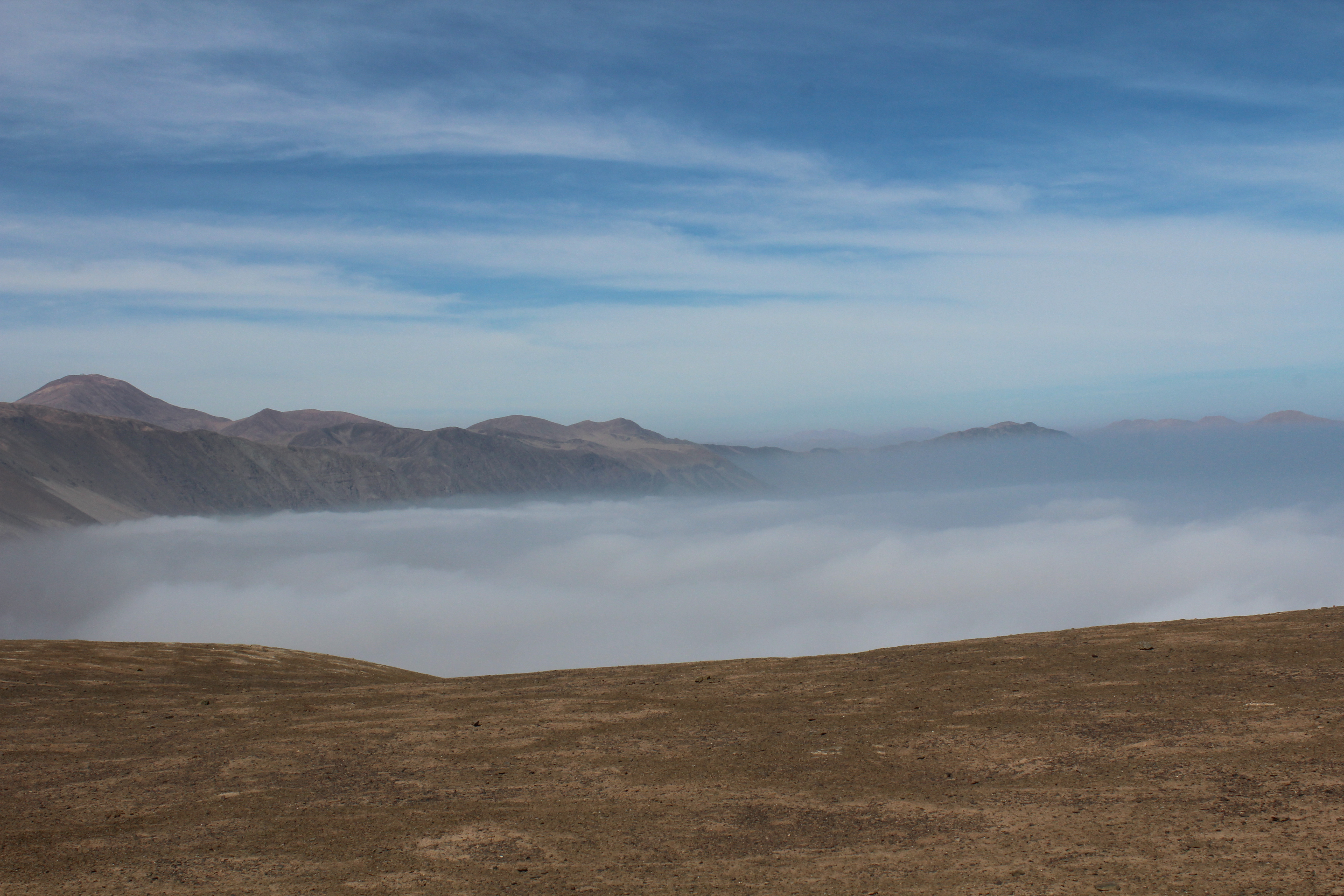 Foto: Nicole Saffie